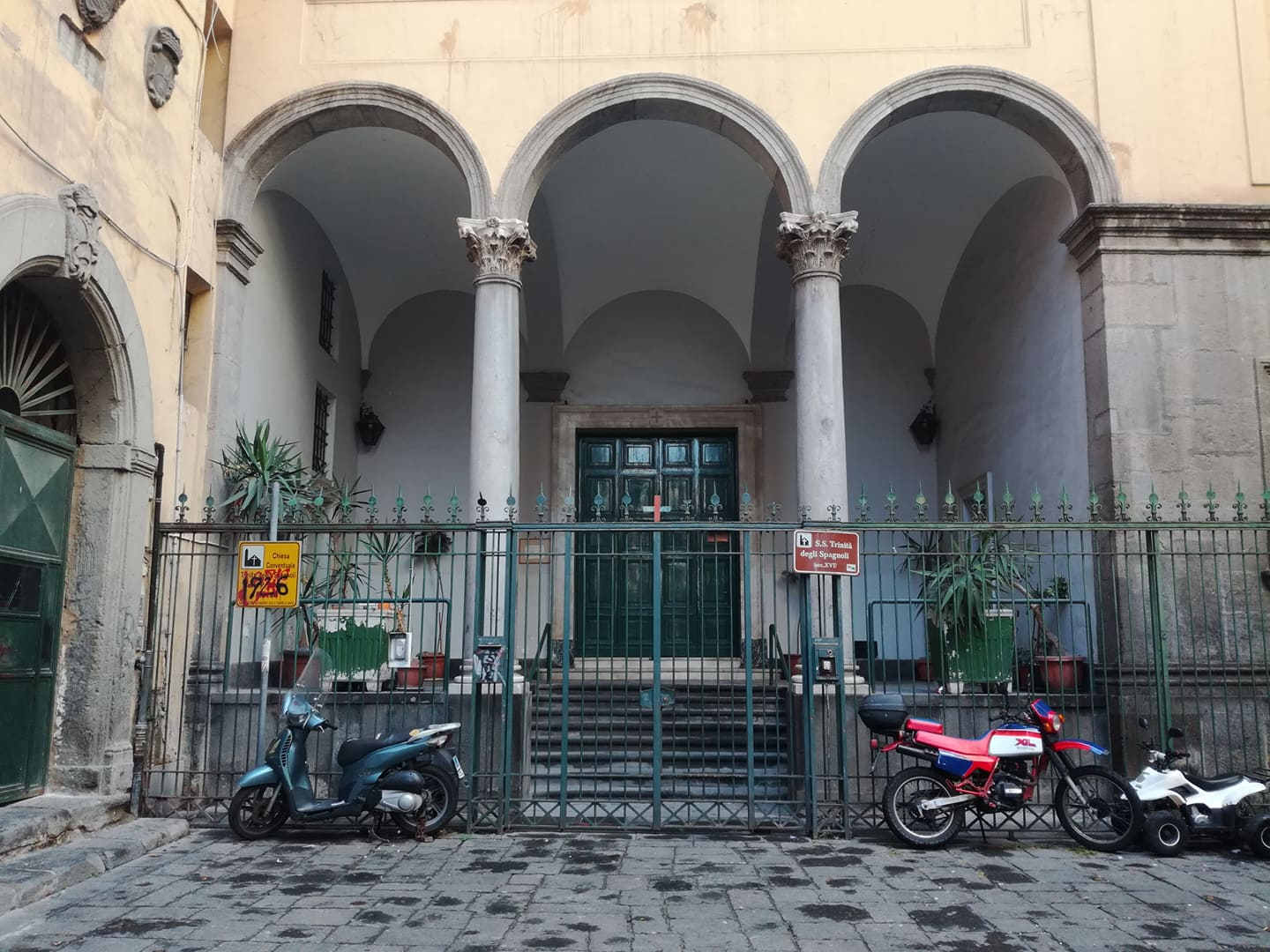 Portico d'ingresso, Trinità degli Spagnoli, Napoli